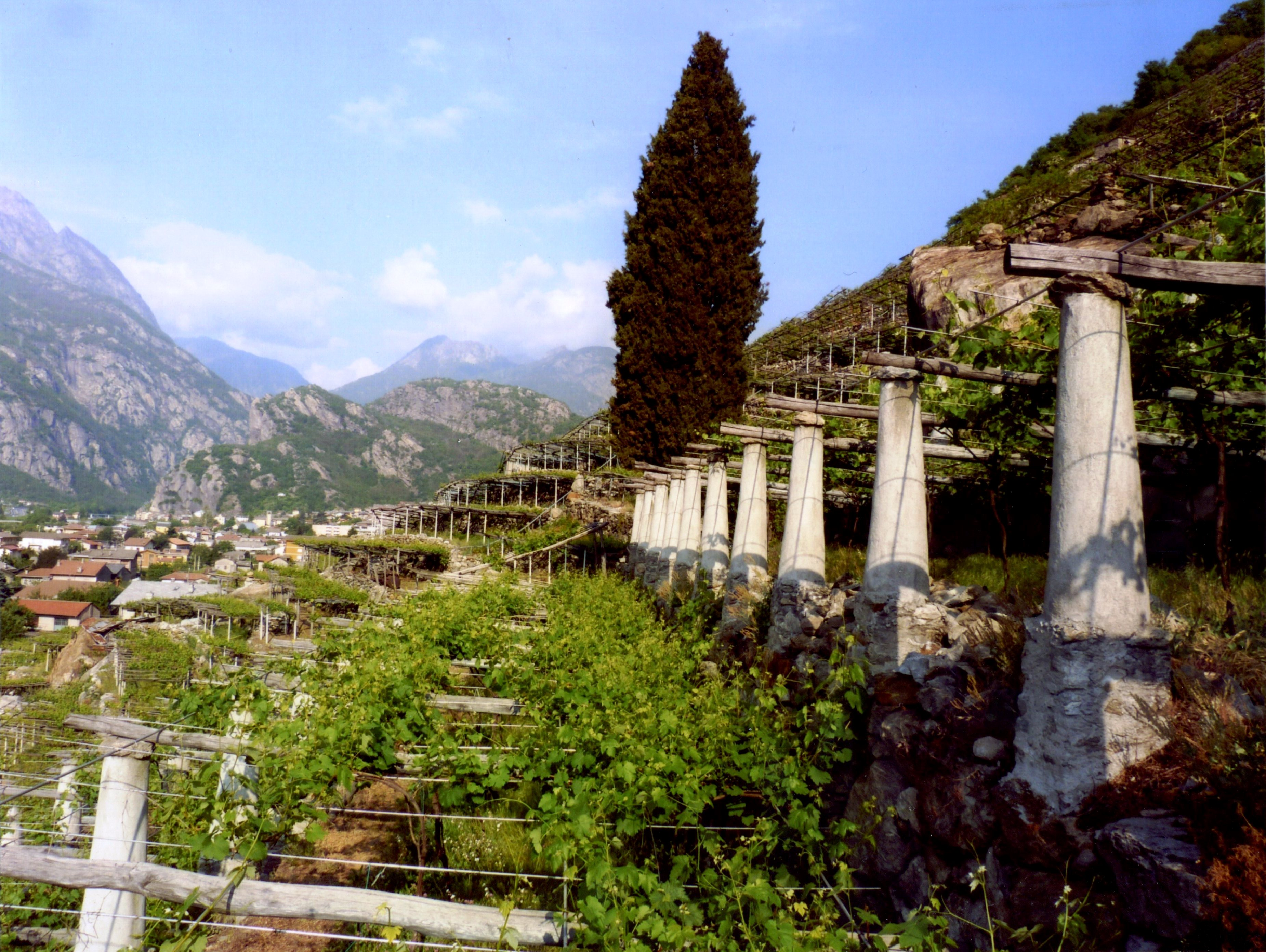 Pergole all'Adret di Donnas, all'imbocco della Valle d'Aosta. Data la pendenza dei versanti la viticoltura è stata definita eroica.